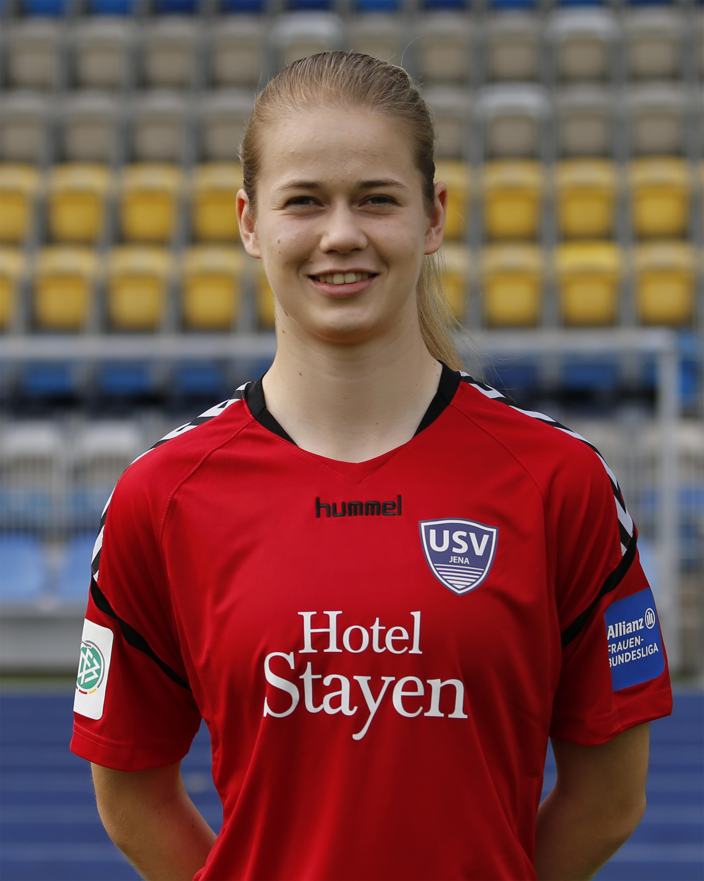 Stina Johannes 2017